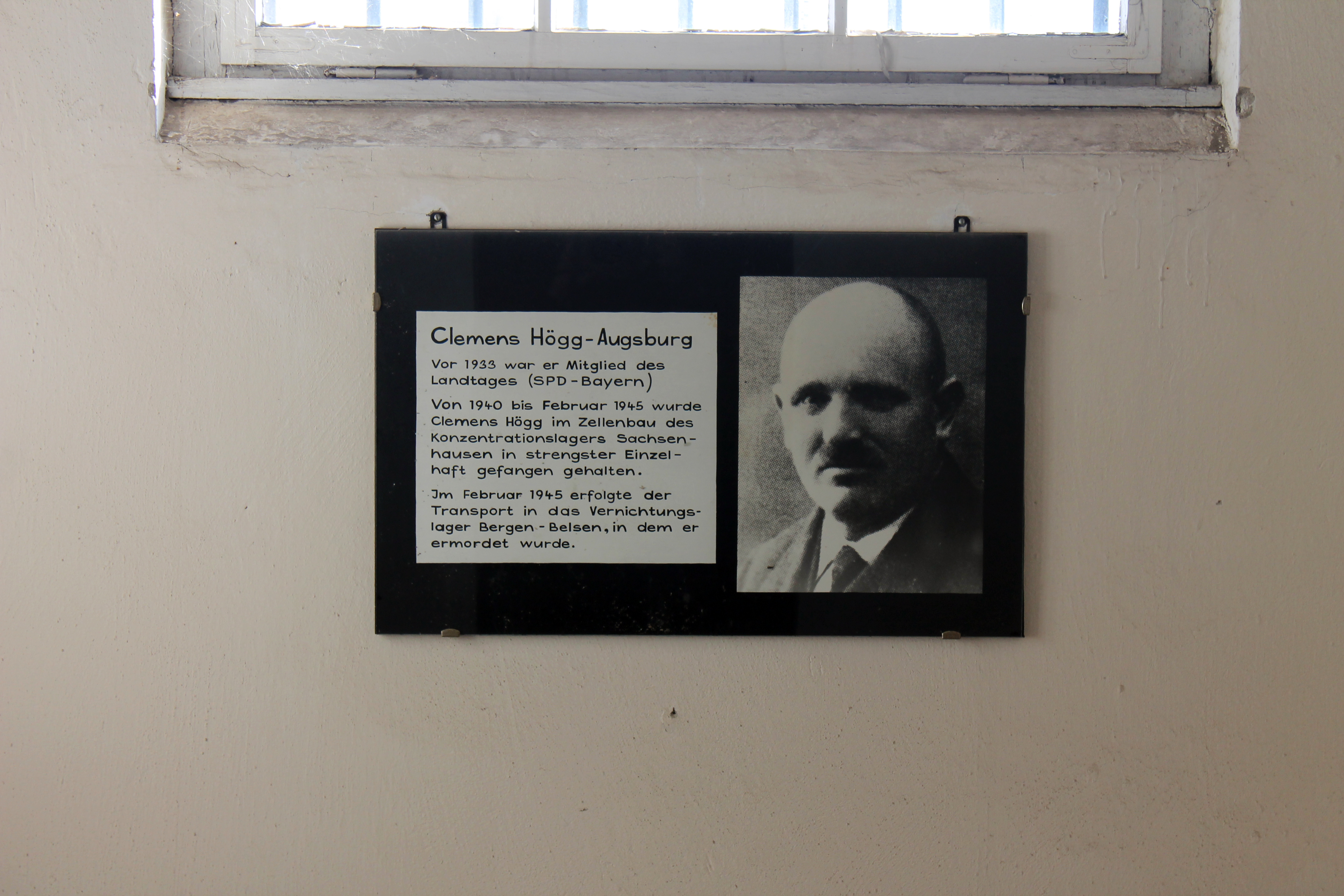 Im gedenken an Clemens Högg, Aushang im Zellenbau des KZ-Sachsenhausens.